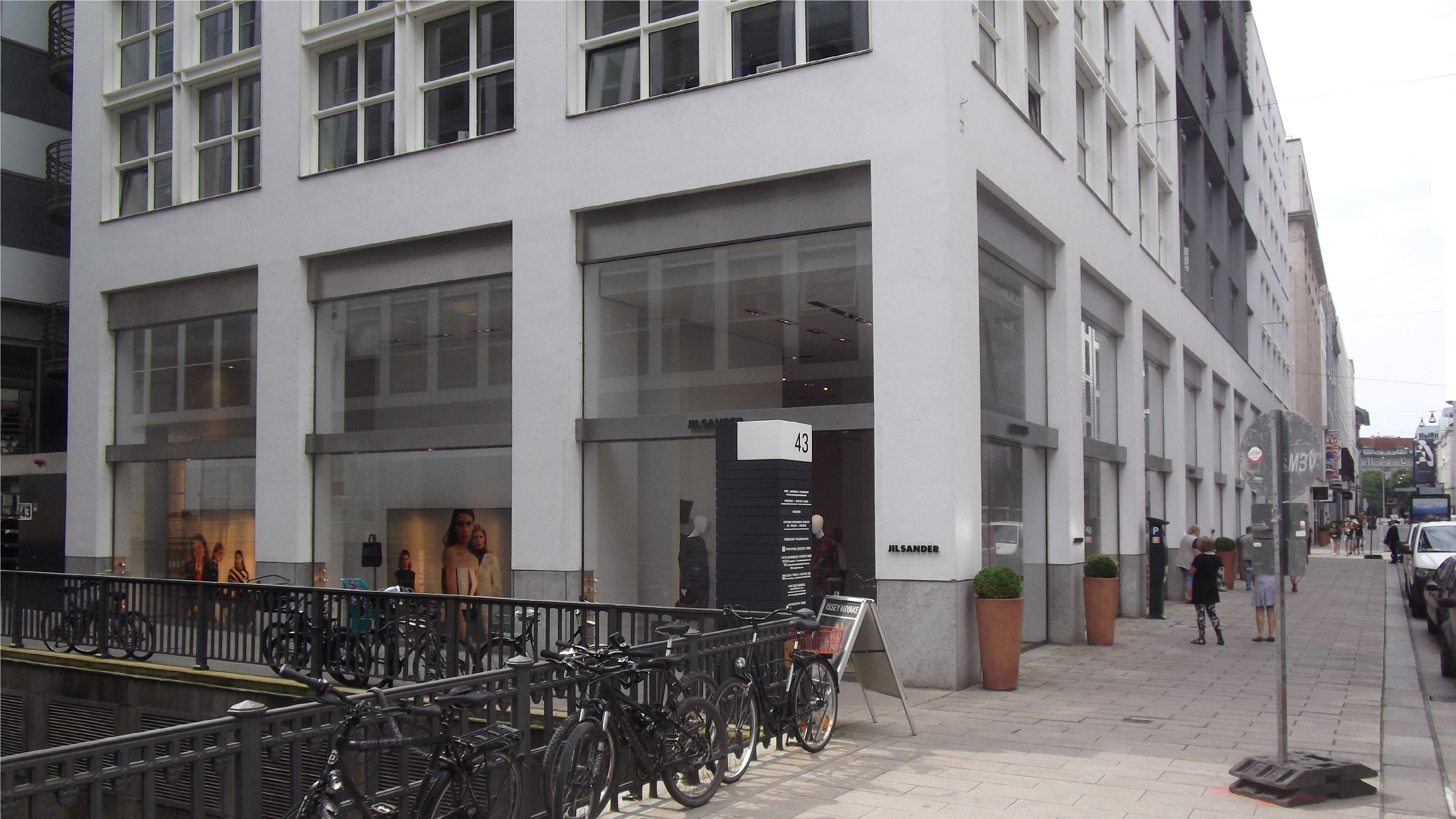 Hamburg Neuer Wall